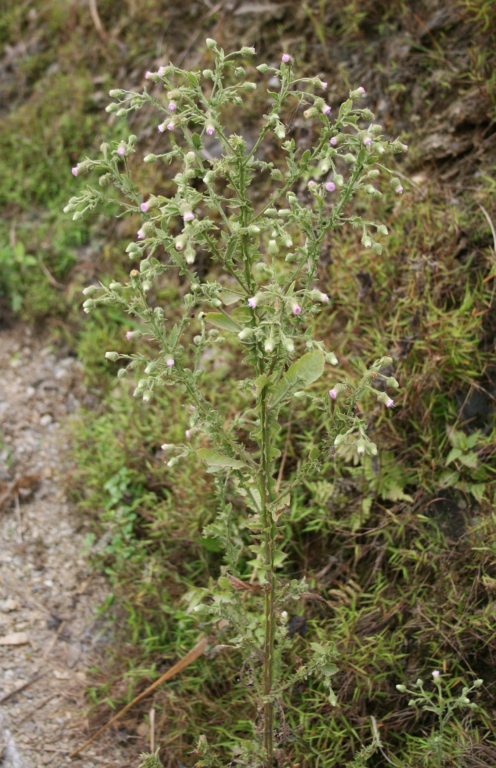 Laggera crispata, Korbblütler (Asteraceae) - Vietnam/Việt Nam: Mường So E Phong Thổ (Prov. Lai Châu)